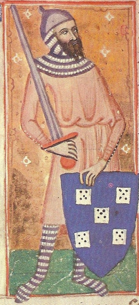 Pere de Portugal. Llibre dels privilegis de Mallorca (fragment)